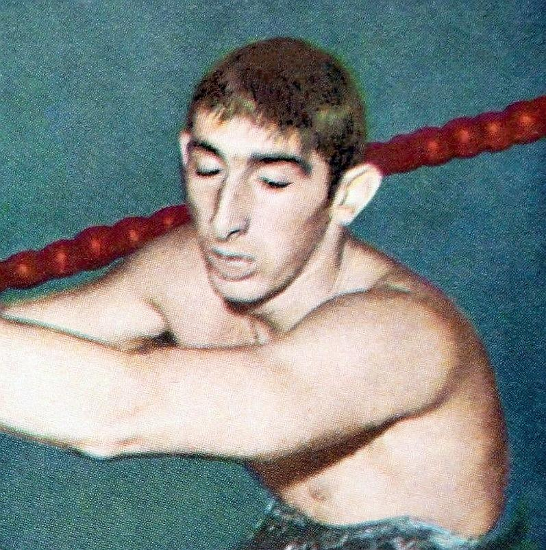 Michel Rousseau en 1972, 'Munchen 72', Panini figurina n°176.